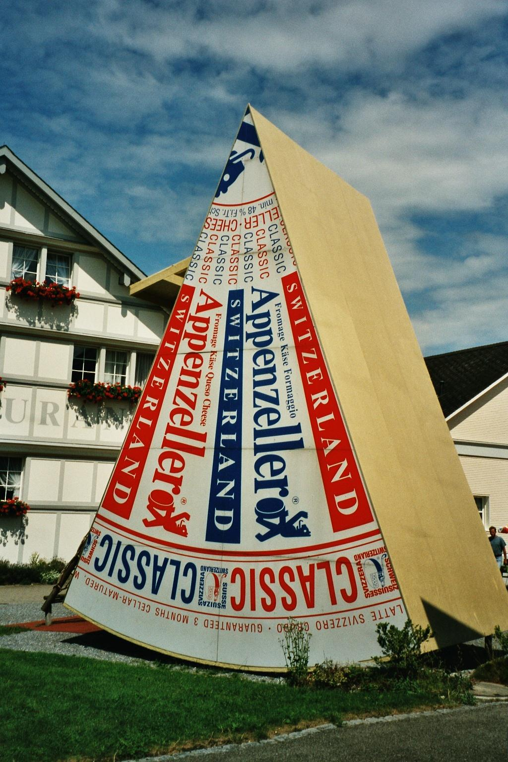 Schaukäserei in Stein AR